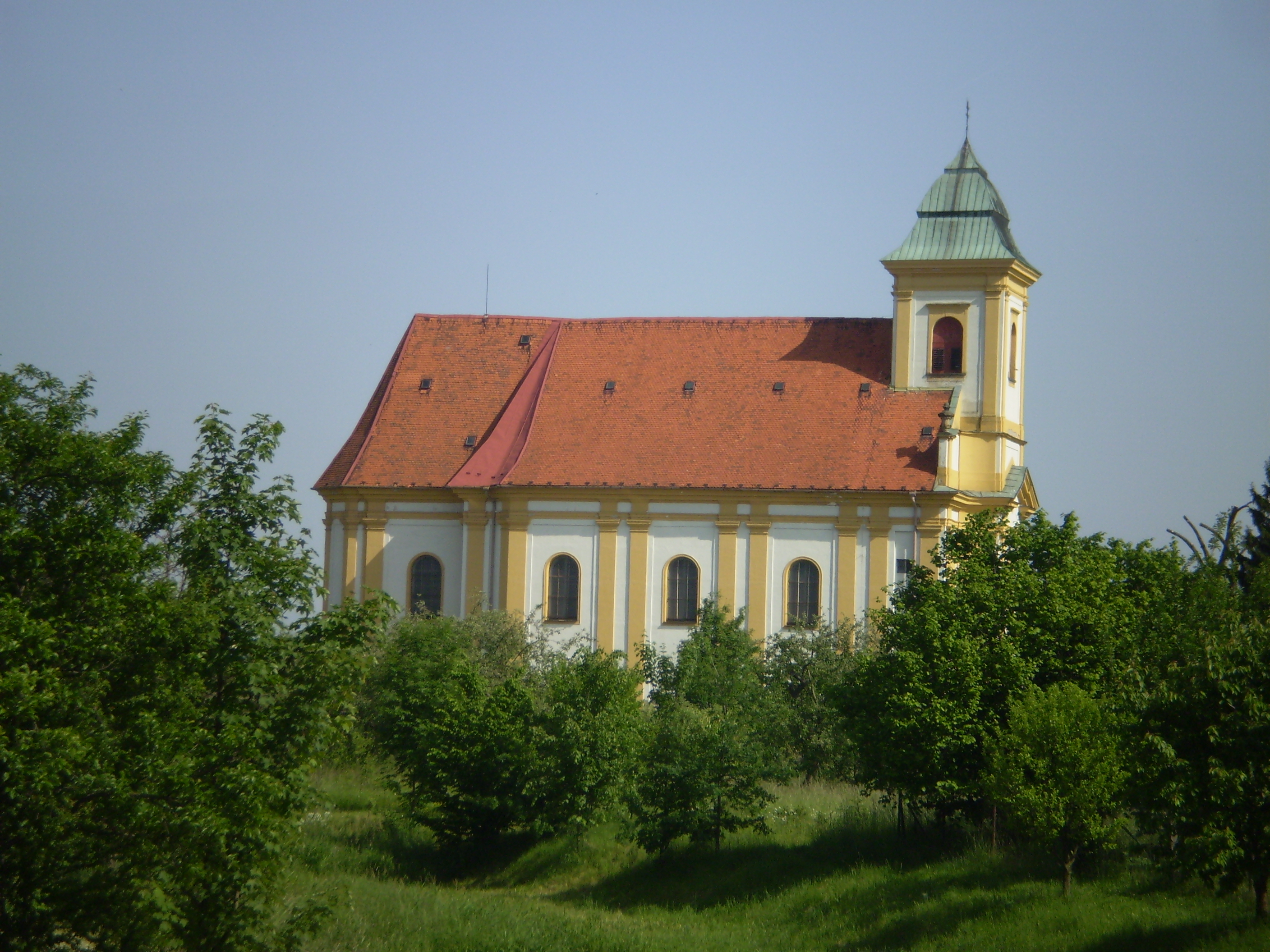 Kostel sv. Vavřince